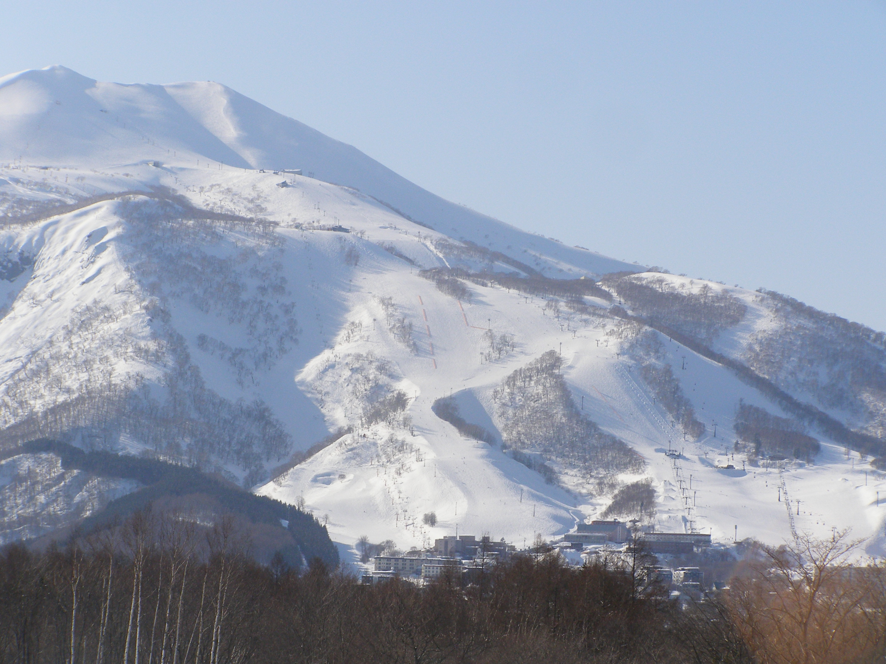 倶知安町比羅夫国道5号線付近から望む